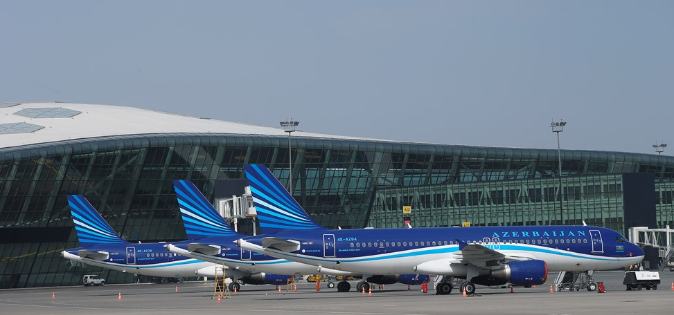 Azərbaycan Hava Yollarının donanması Heydər Əliyev Beynəlxalq Hava Limanında